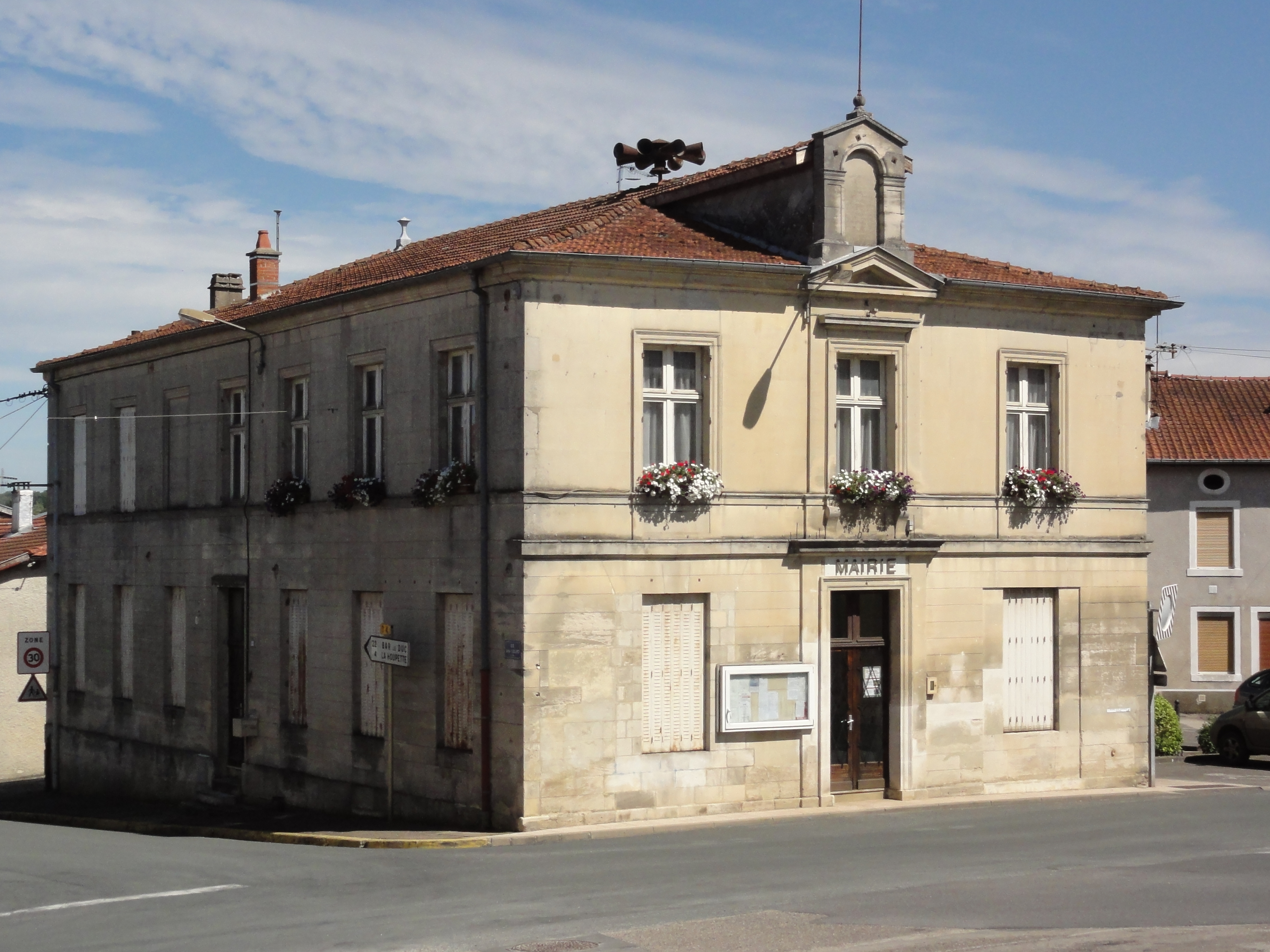 Cousances-les-Forges (Meuse) mairie